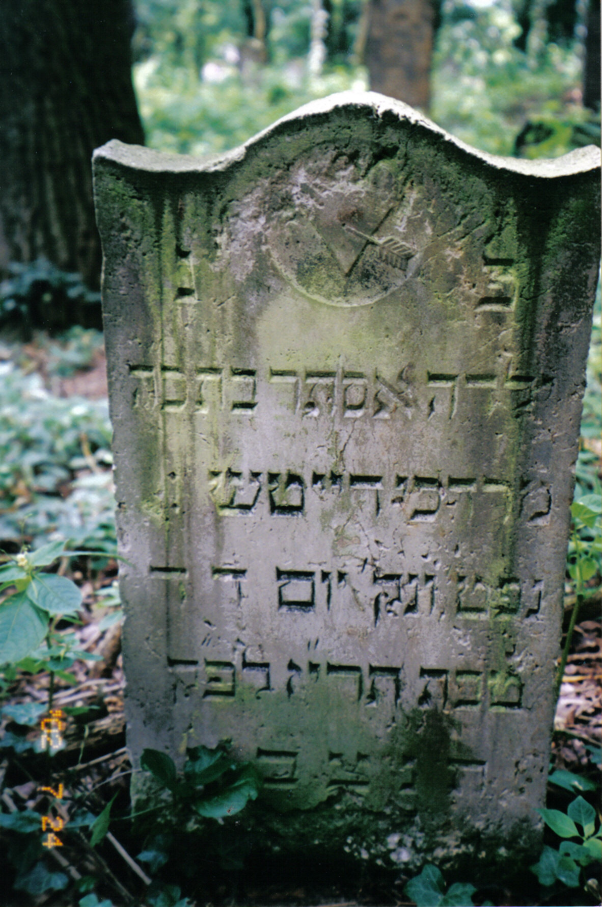 Jeden z nagrobków na cmentarzu żydowskim w Skwierzynie, woj. lubuskie. Najprawdopodobniej z 1880 roku.